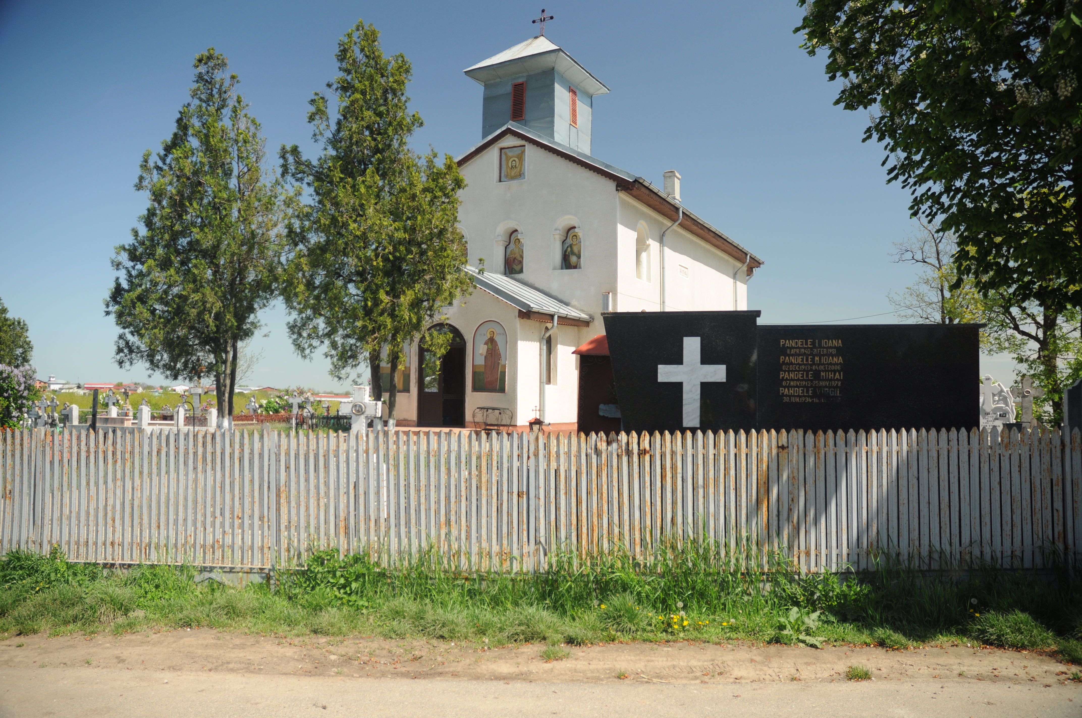 Biserica "Adormirea Maicii Domnului și Sf. Dumitru"- a fostei mănăstirii Surlari